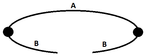 ısılçifti